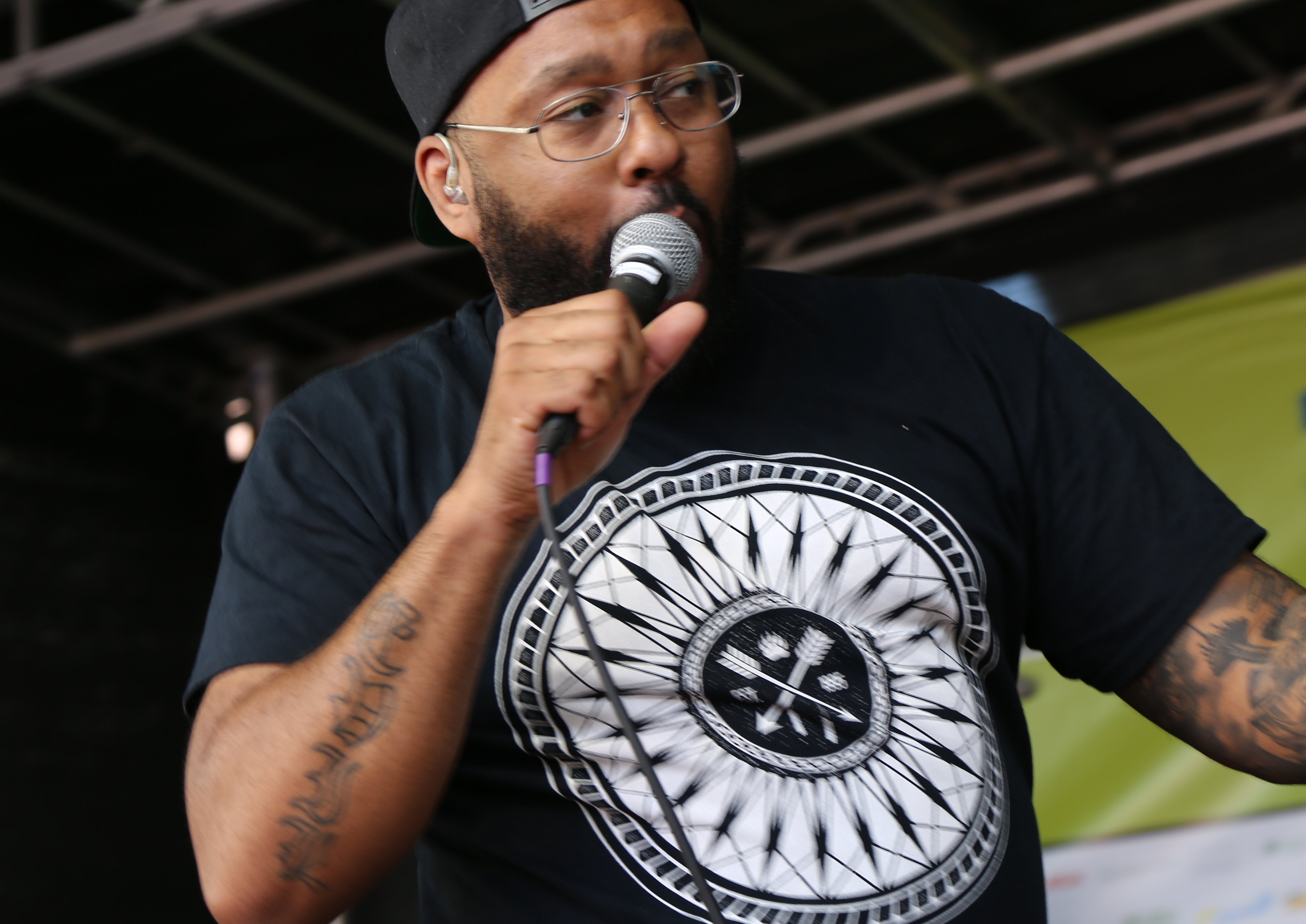 Roger Rekless, MC, HipHopper, Rapper, am 2018-05-10 in München auf der NoPAG-Demo